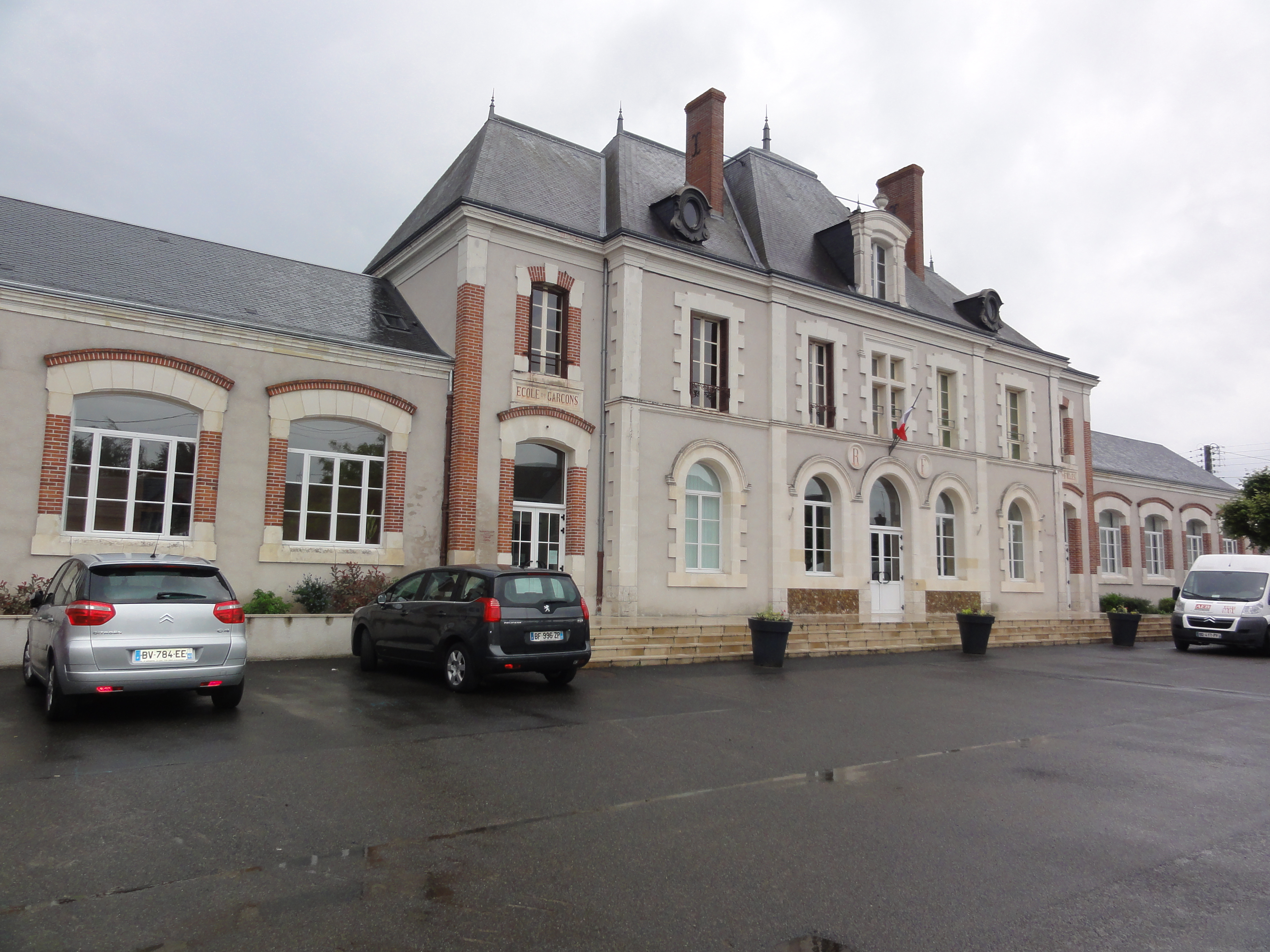 Saint-Claude-de-Diray (Loir-et-Cher) Mairie-écoles